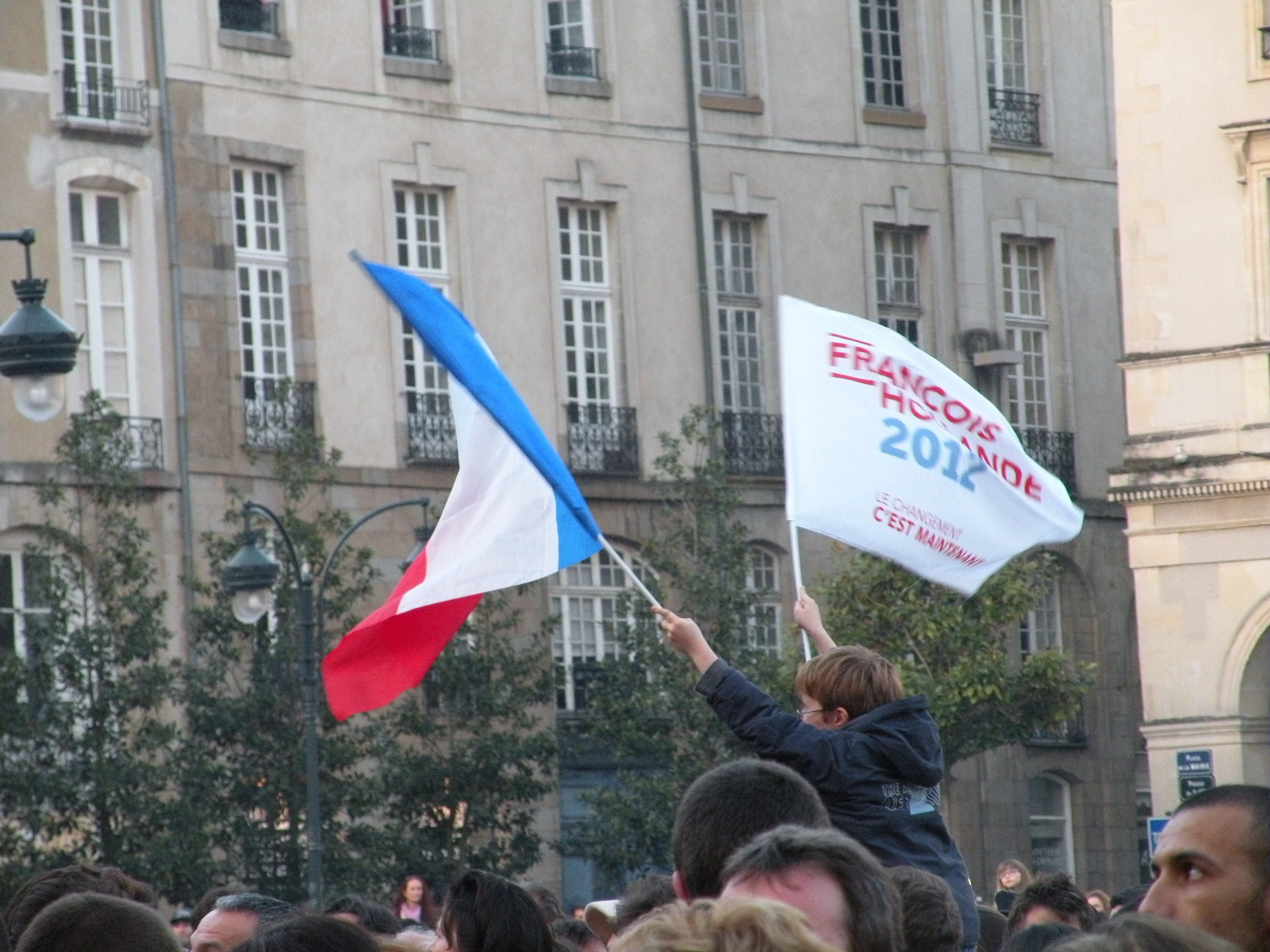 La place de la mairie de Rennes, le 6 mai 2012 à l'occasion de l'élection de François Hollande.